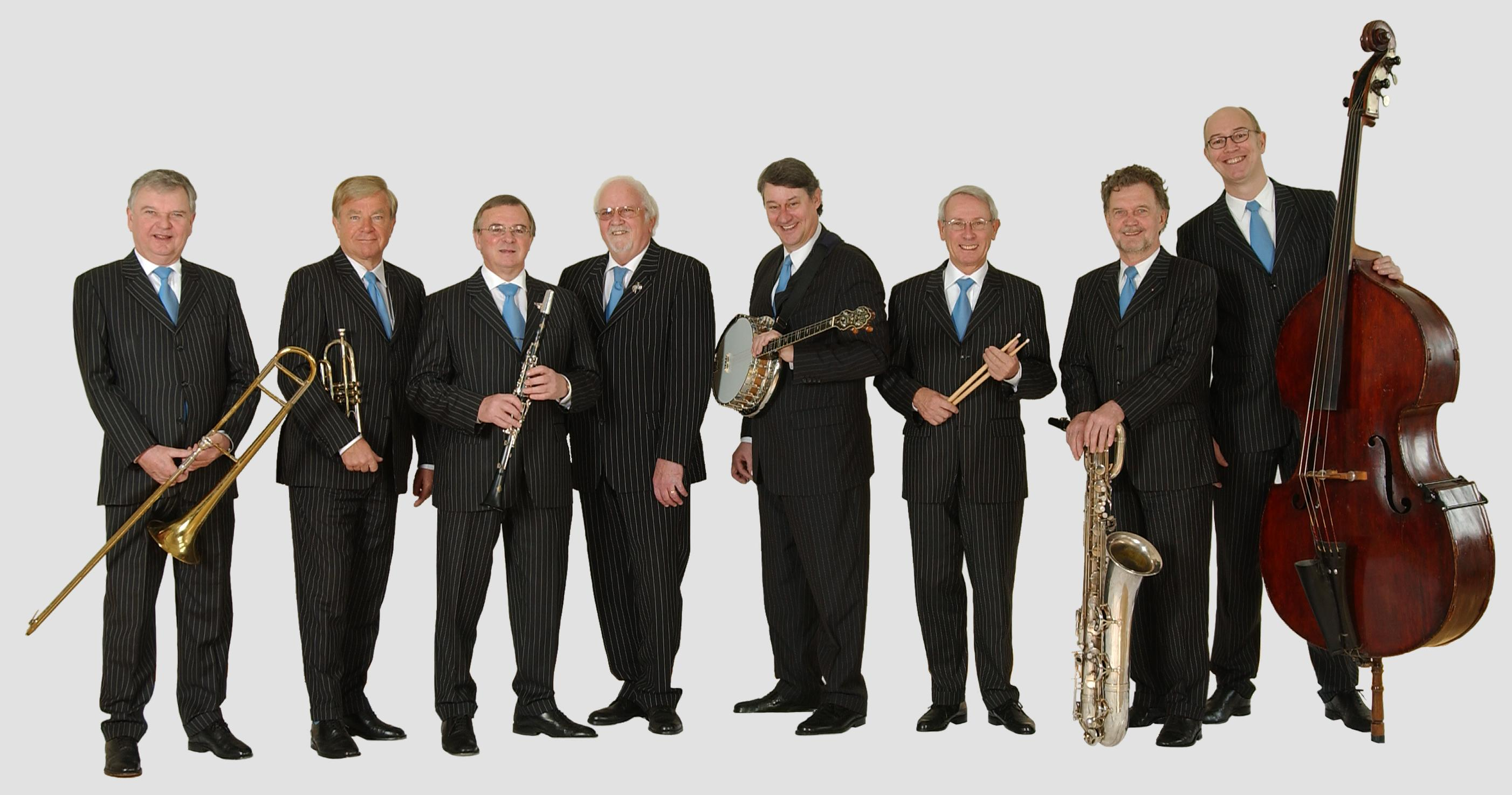 Dutch Swing College Band Photo 2007